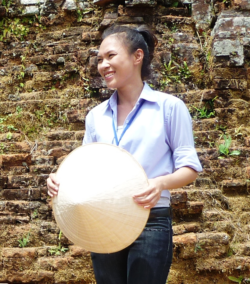 Singer Mỹ Tâm